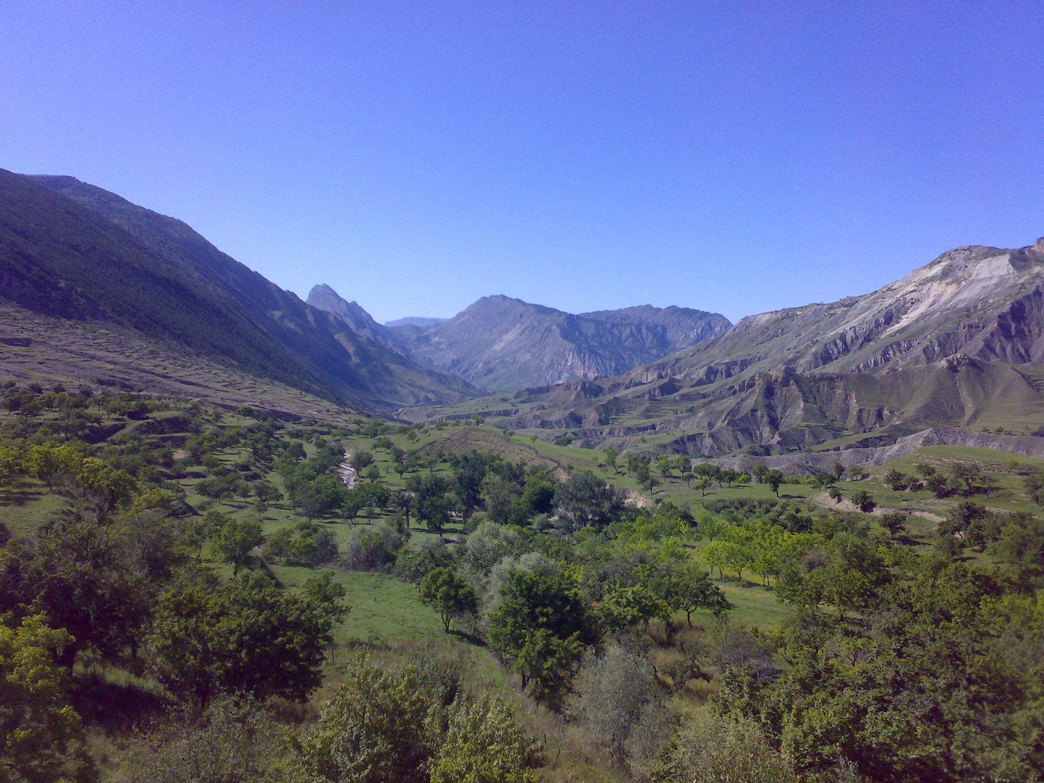 Сады